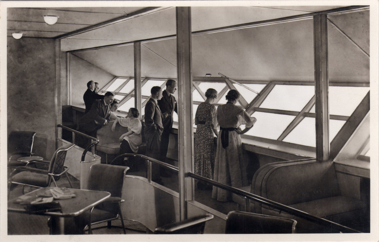 Nationaal Archief / Spaarnestad Photo, SFA001010737 Interieur van de salon van het luchtschip Hindenburg. Het raam staat open, wat in een vliegtuig niet kan. Interior of the lounge of airship Hindenburg. The windows can be opened! Collectie Spaarnestad Voor meer informatie en voor meer foto’s uit de collectie van Spaarnestad Photo, bezoek onze Beeldbank: U kunt ons helpen onze kennis van de fotocollecties te verrijken door tags en commentaren toe te voegen. Herkent u mensen of locaties of heeft u een bijzonder verhaal te vertellen bij één van de foto’s, laat dan een reactie achter (als u ingelogd bent bij Flickr) of stuur een mailtje naar: You can help us gain more knowledge on the content of our collection by simply adding a comment with information. If you do not wish to log in, you can write an e-mail to